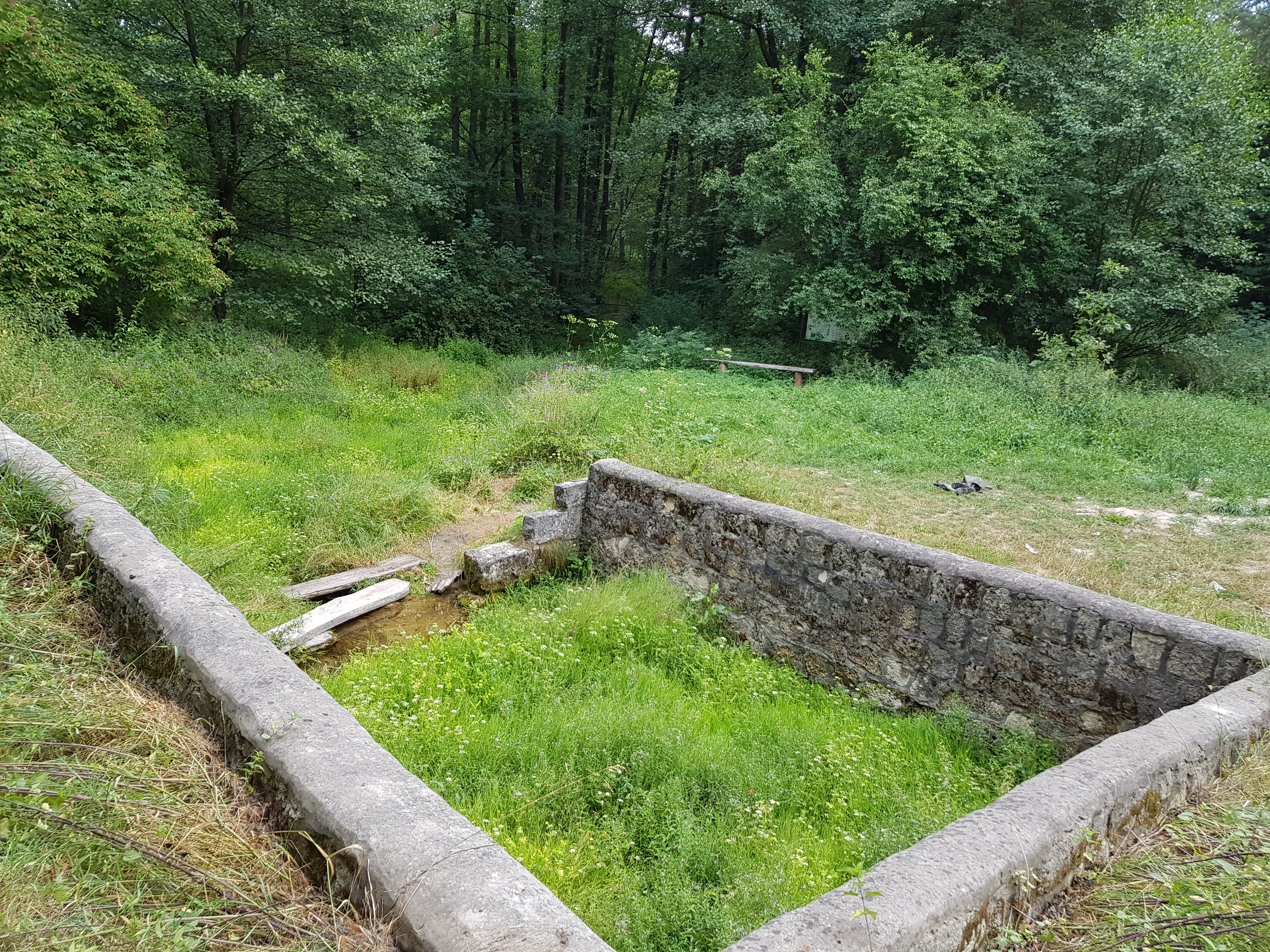 Źródlisko w Trzęsinach, pomnik przyrody nieożywionej (rozp. wojewody zamojskiego z dn. 19.11.1998)